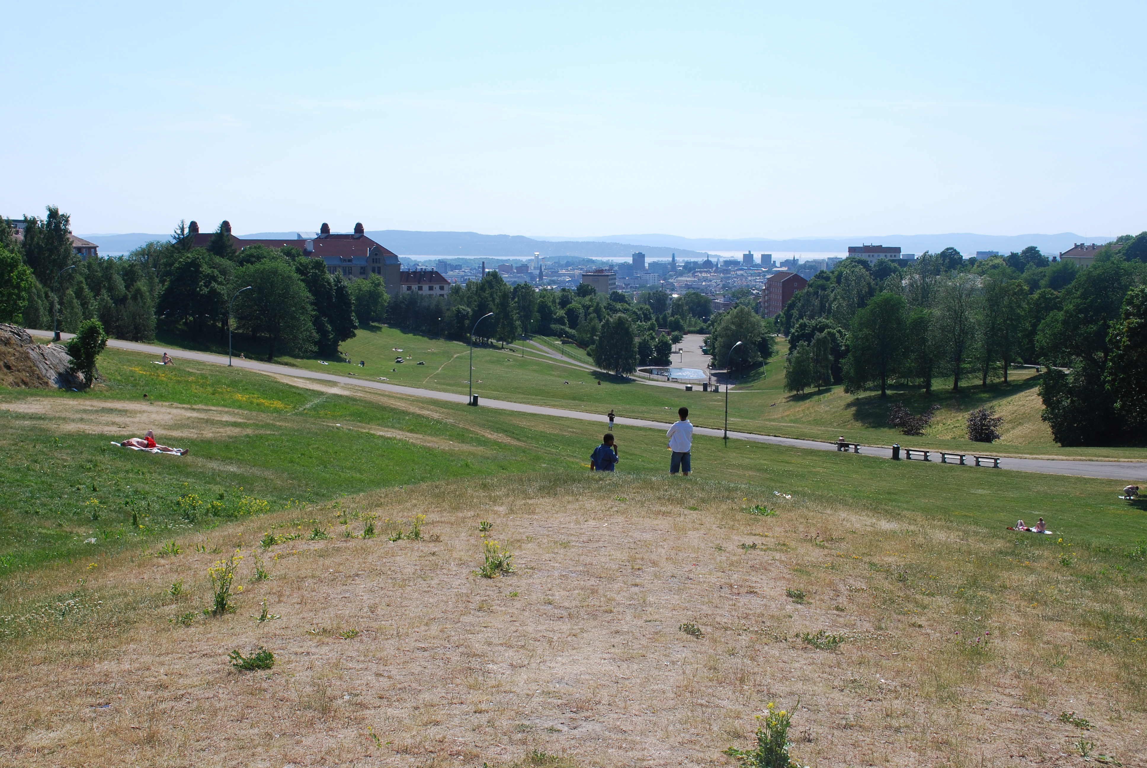 Torshovdalen, sett fra toppen av parken